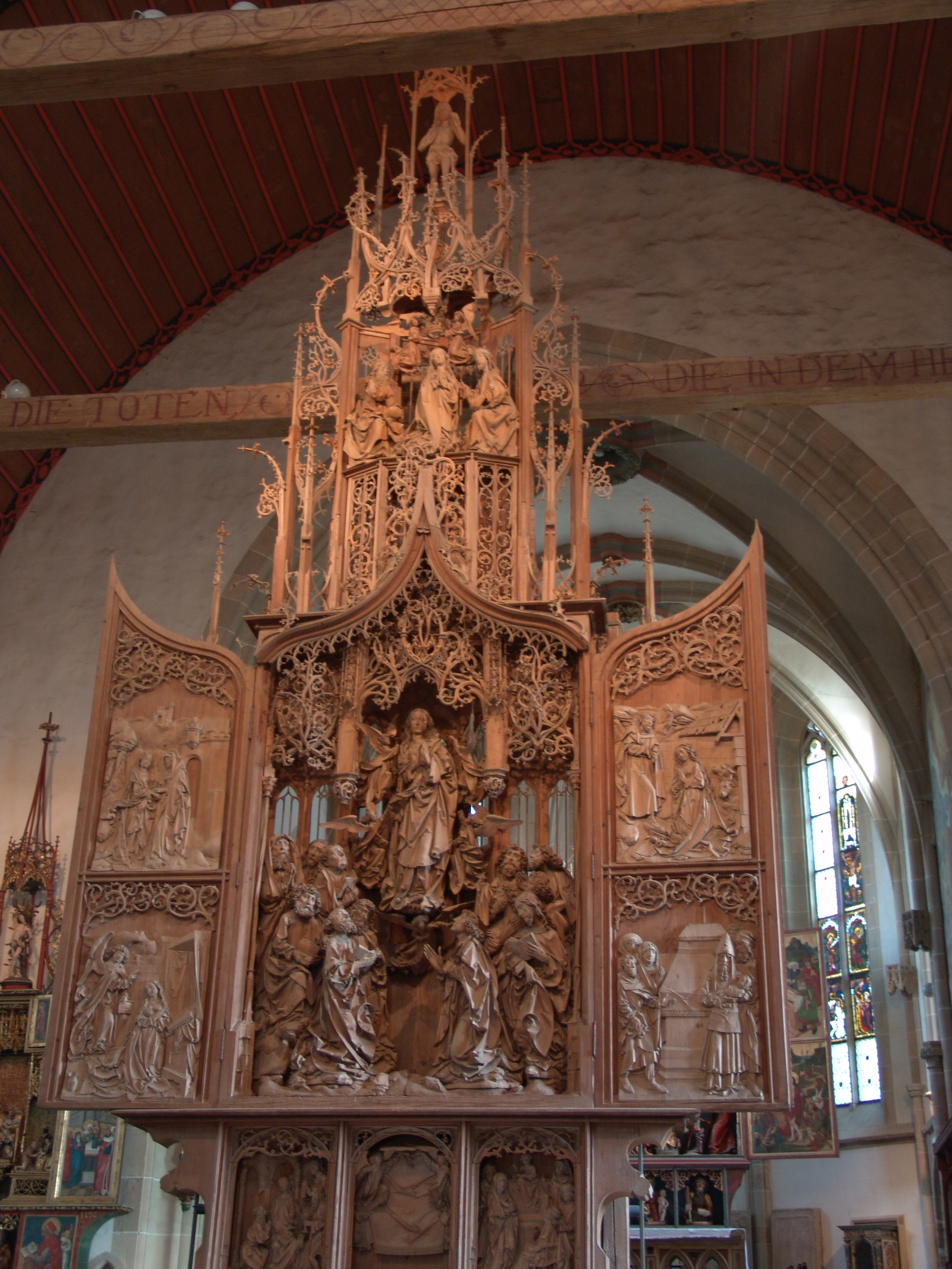 Marienretabel von Tilman Riemenschneider